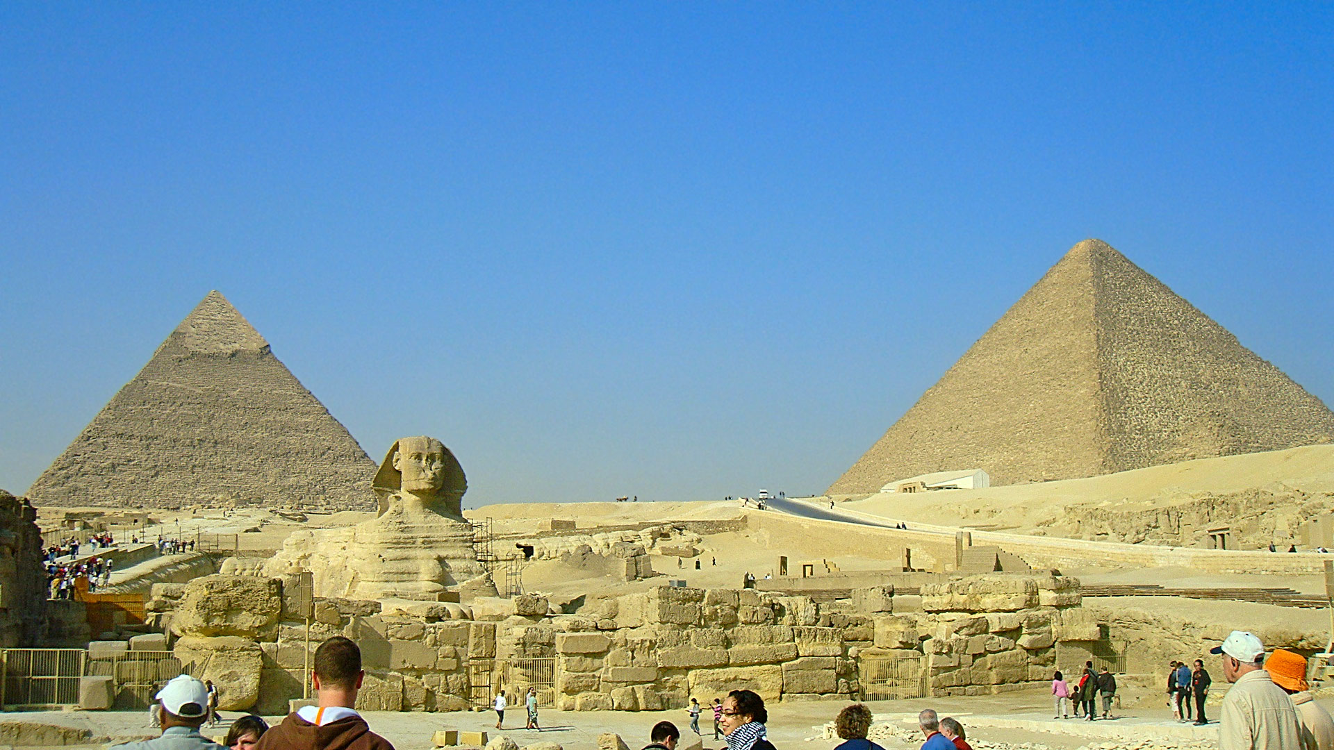 giza